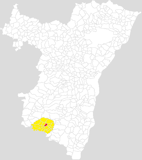 Communauté de communes du canton de Villé